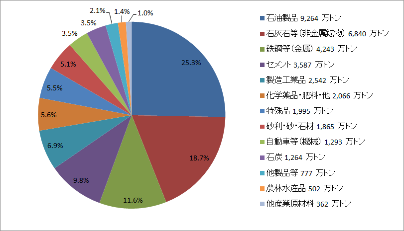 主要品目別内航輸送量